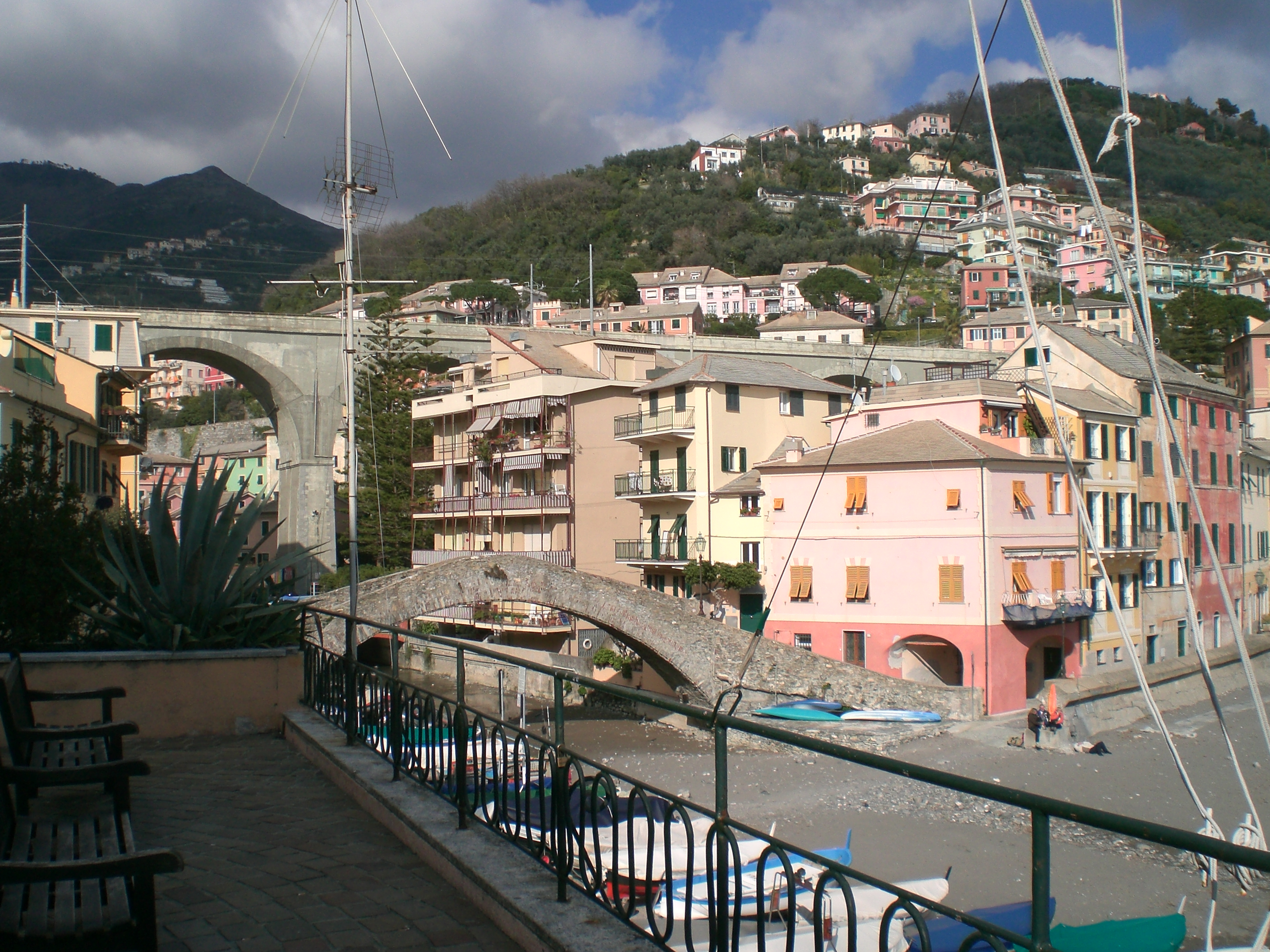 Bogliasco, Provincia di Genova, Italia